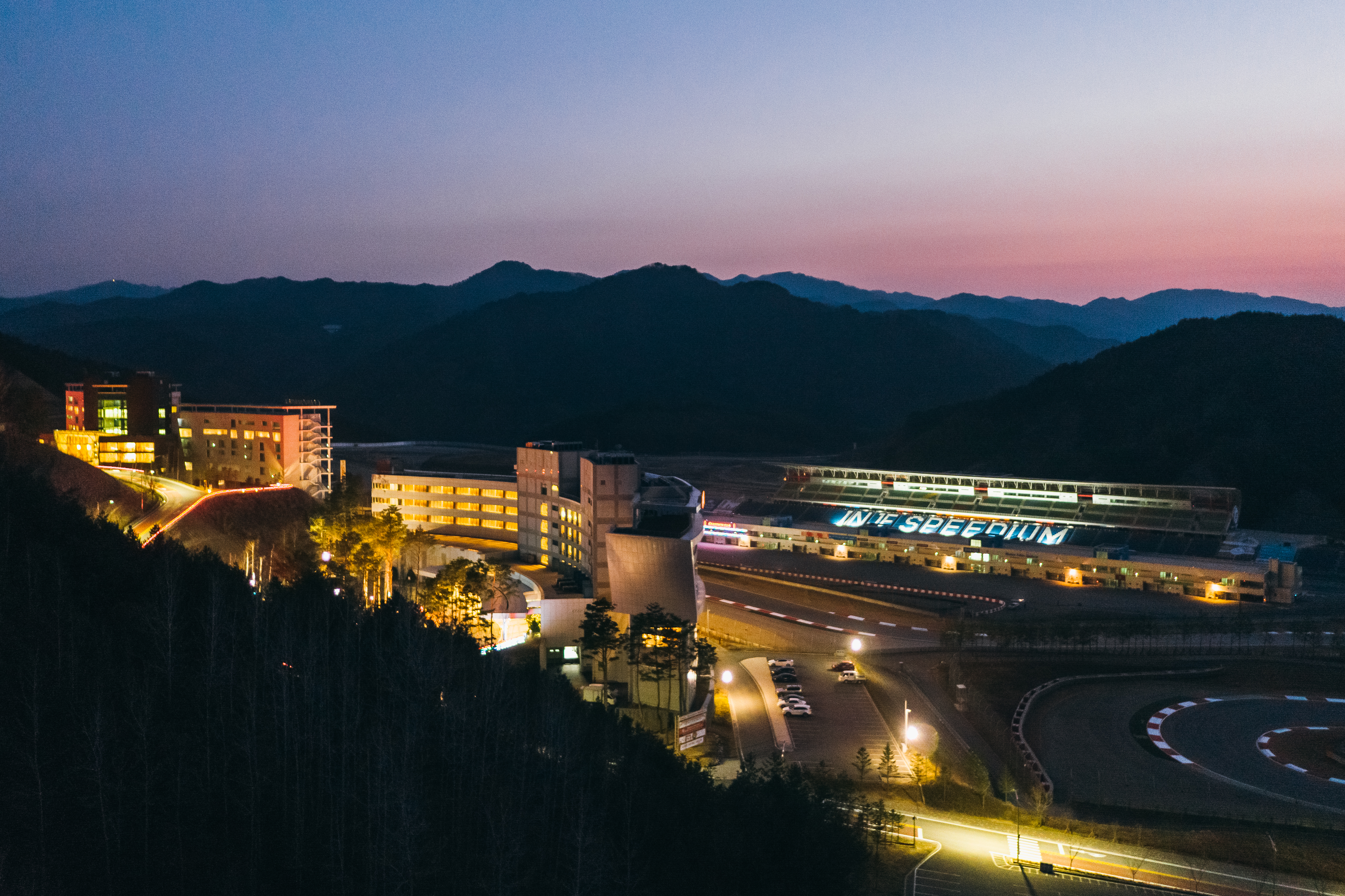 인제스피디움 야간 전경사진